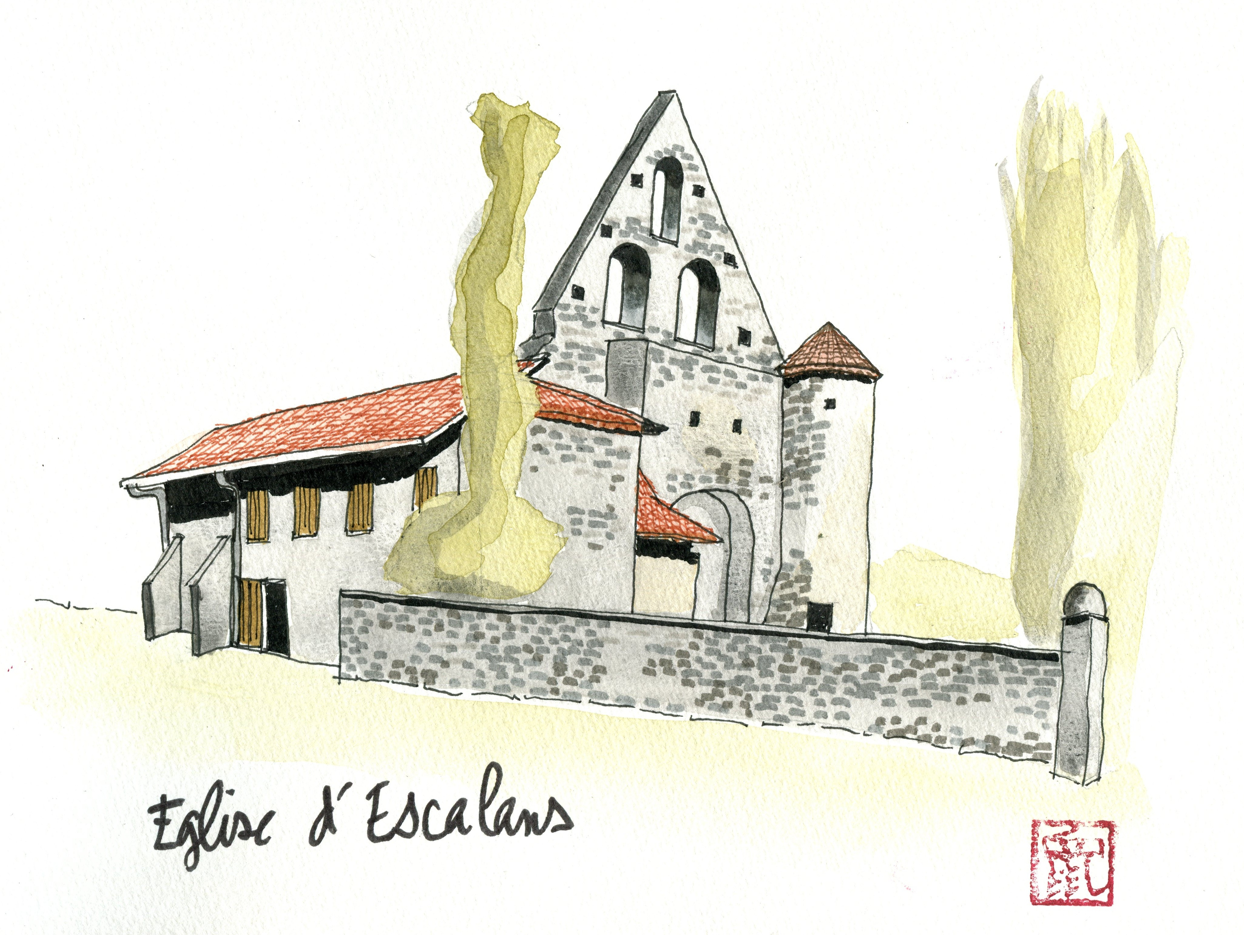 Aquarelle de l'église Saint-Jean-Baptiste d'Escalans dans le département français des Landes.